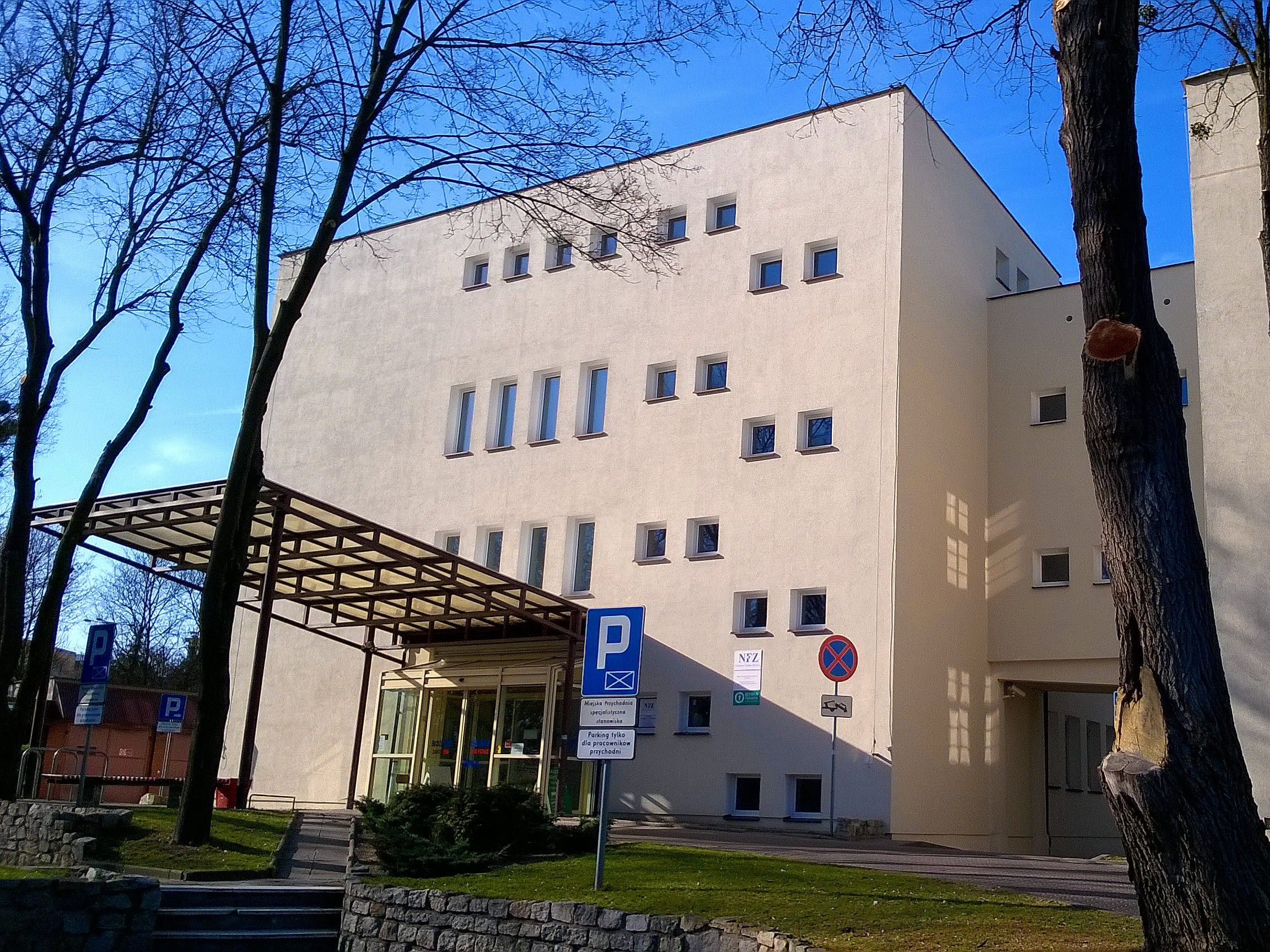 Przychodnia Miejska przy ulicy Uniwersyteckiej w Toruniu